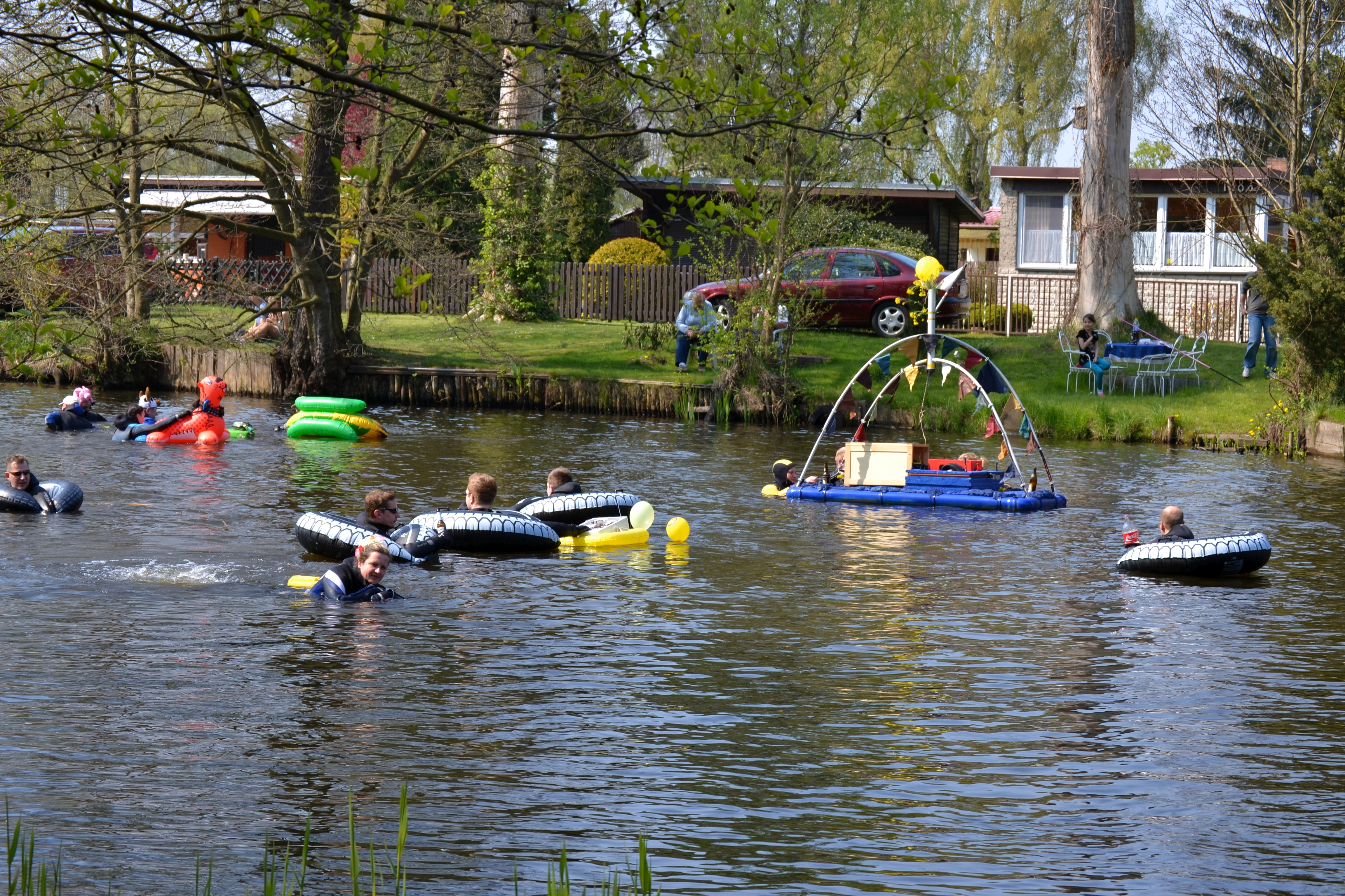 17. Spreetreiben von Neu Zittau nach Erkner am 19. April 2014 kurz hinter dem Start an der Brücke Neu Zittau